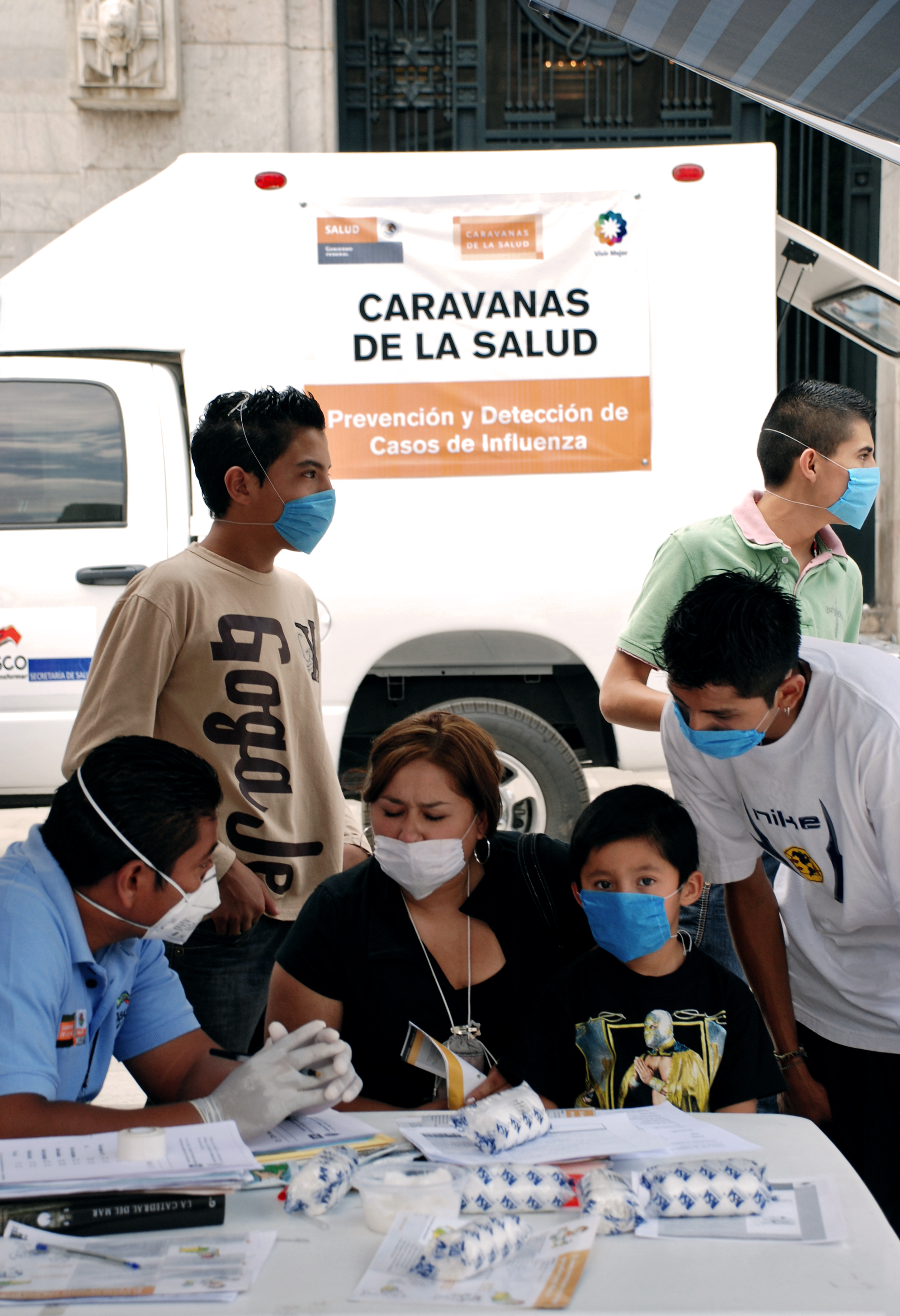 Una familia habla con uno de los enfermeros que atienden a la población en las Caravanas de Salud. Estas, se localizan en puntos estratégicos en toda la ciudad y pueden aplicar pruebas rápidas de influenza. A family talks to a nurse in a Health Convoy.